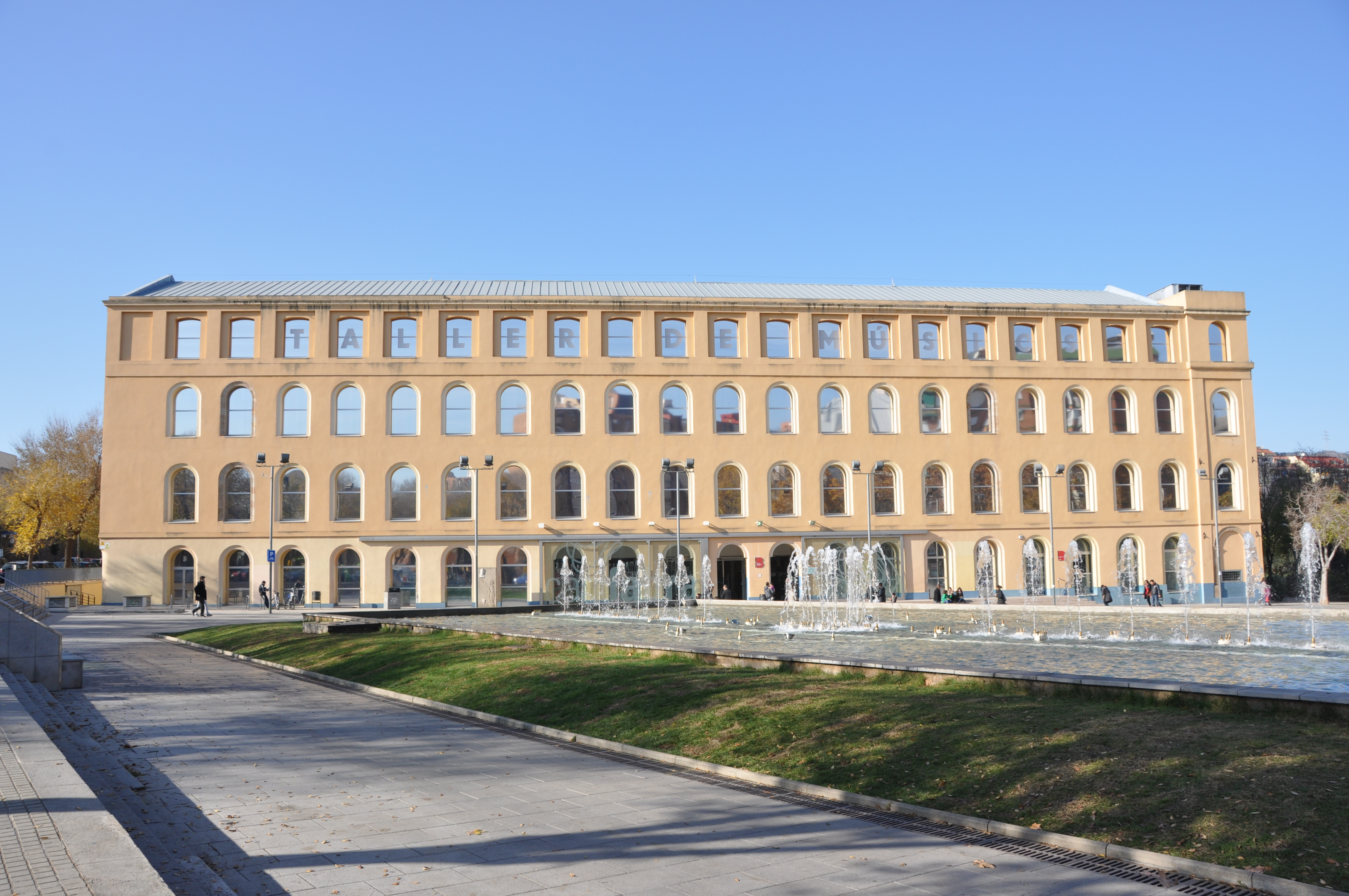 Barcelona, Centre Cultural Can Fabra, antiga fàbrica "Vapor del Rec", 1836-1840, rehabilitat l'any 2002